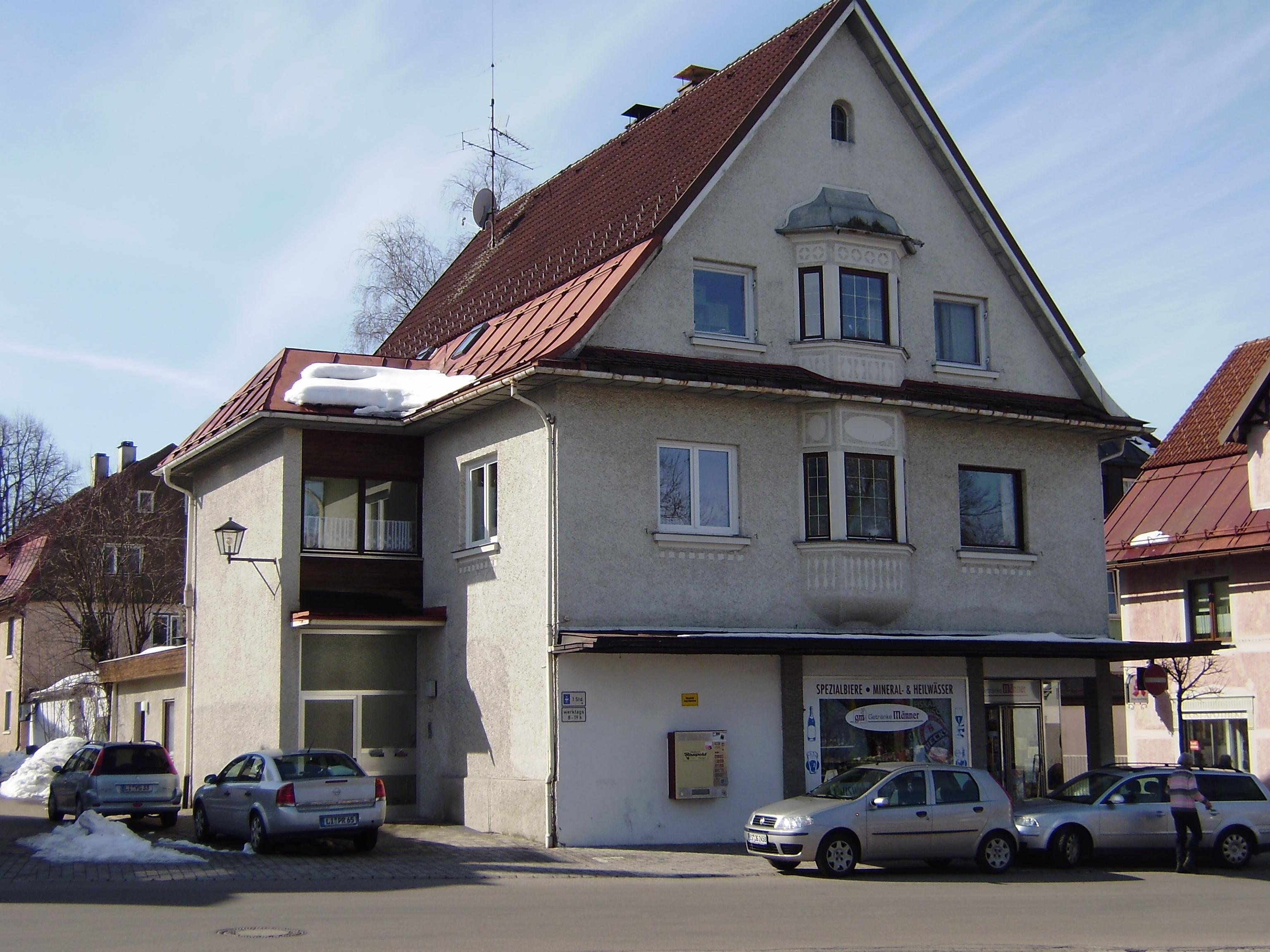 Geschäftshaus Stadelmann, Bahnhofstr 10, Weiler iA. Errichtet 2010 von Architekt und Baumeister Georg Bufler.